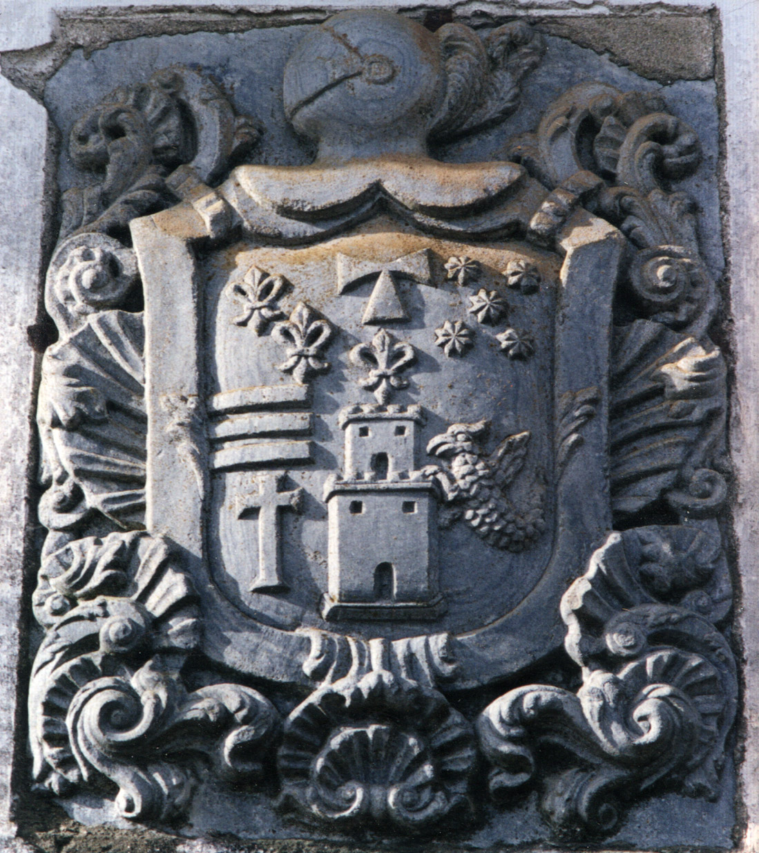 Escudo de la Casa de Albarado de Rubián de Cima (Incio)